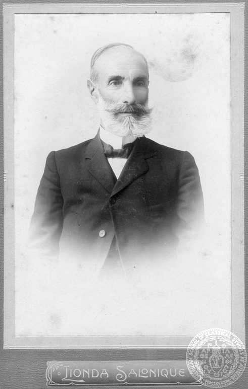 Констнтинос Ватикиотис